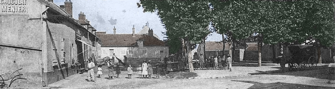 Esmans carte postale vers 1908; vue modifiée et colorisée de la place de la mairie.